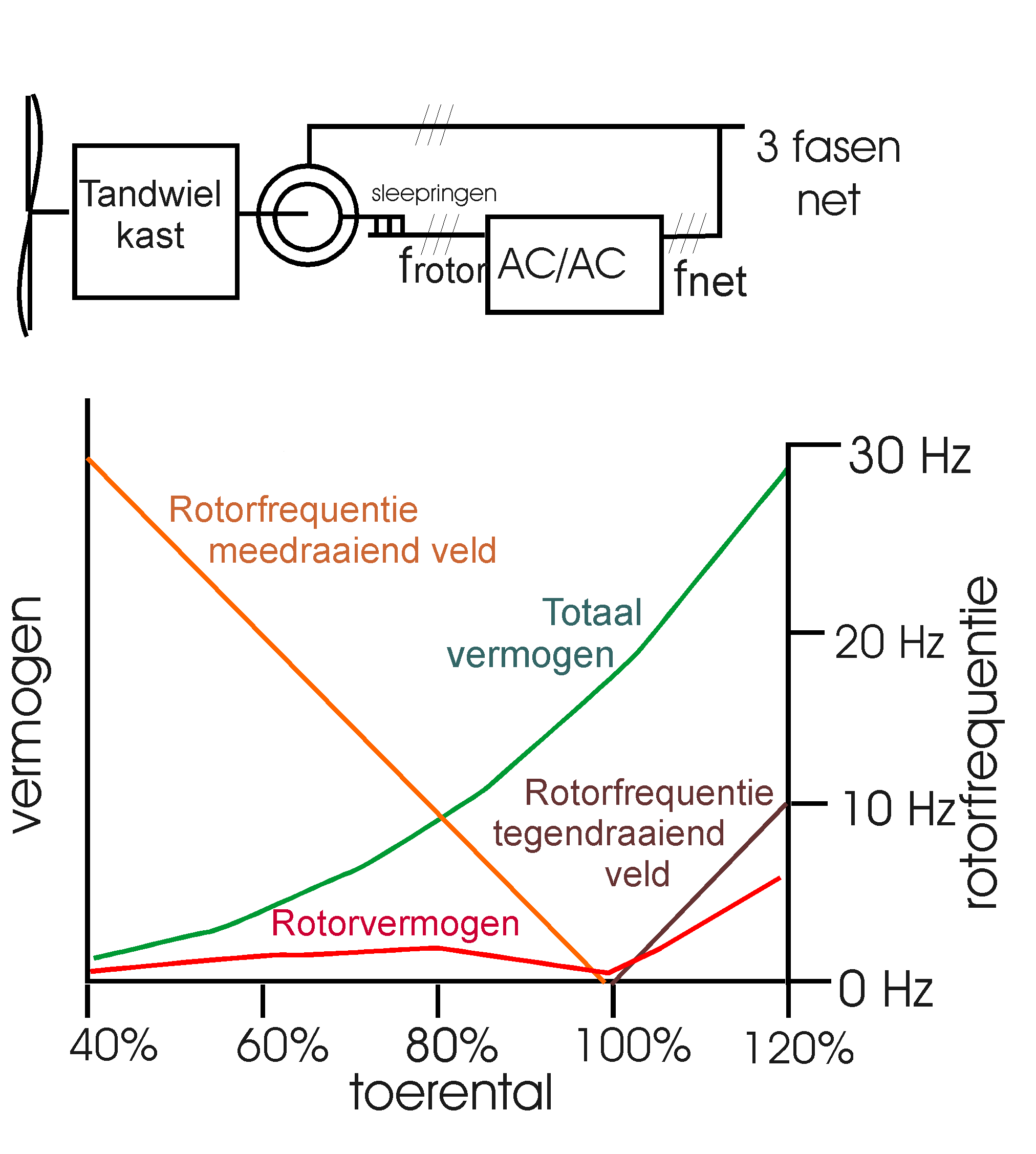 blokschema dubbel gevoede electrogenerator voor windturbine